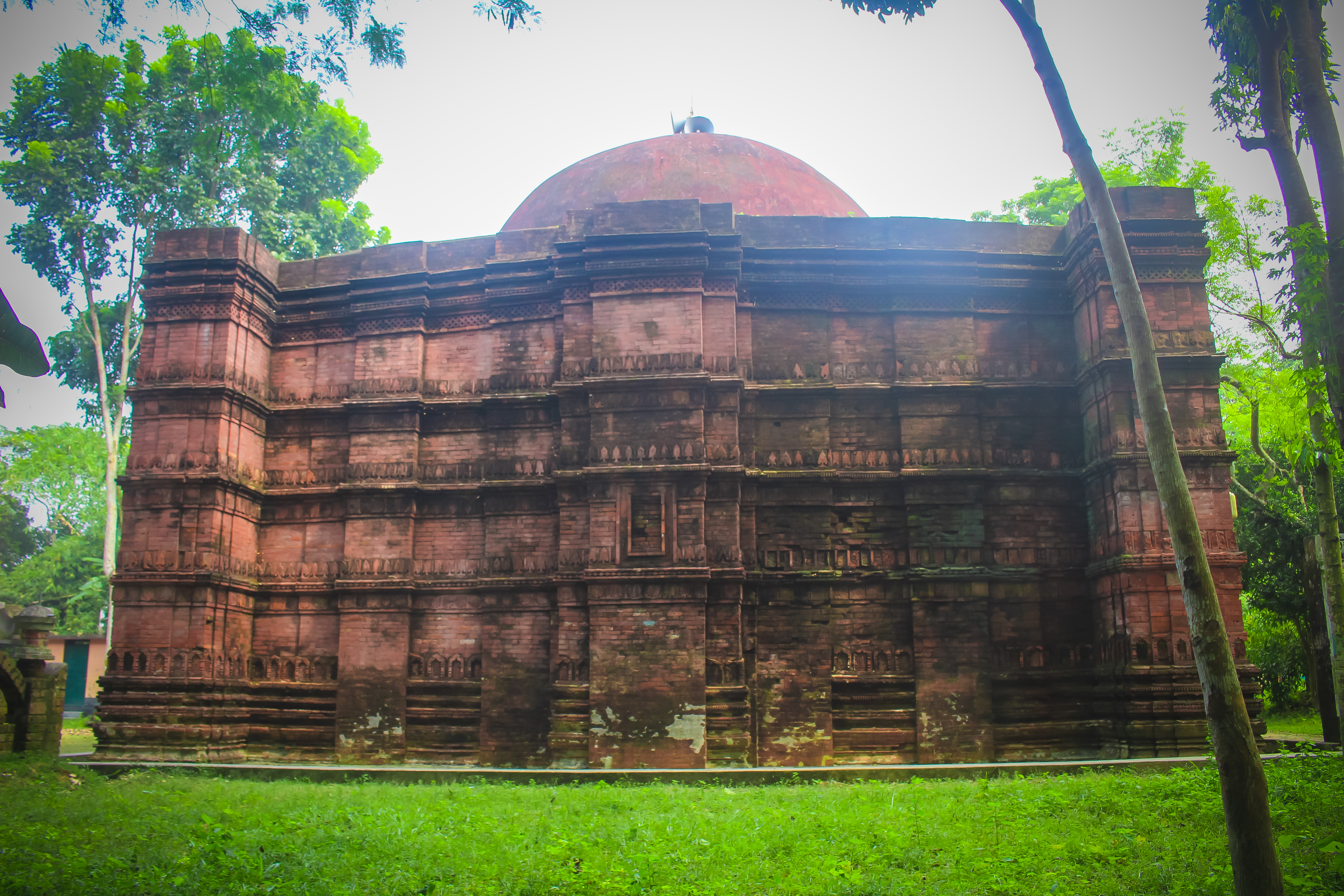 প্রবাজপুর শাহী মসজিদ